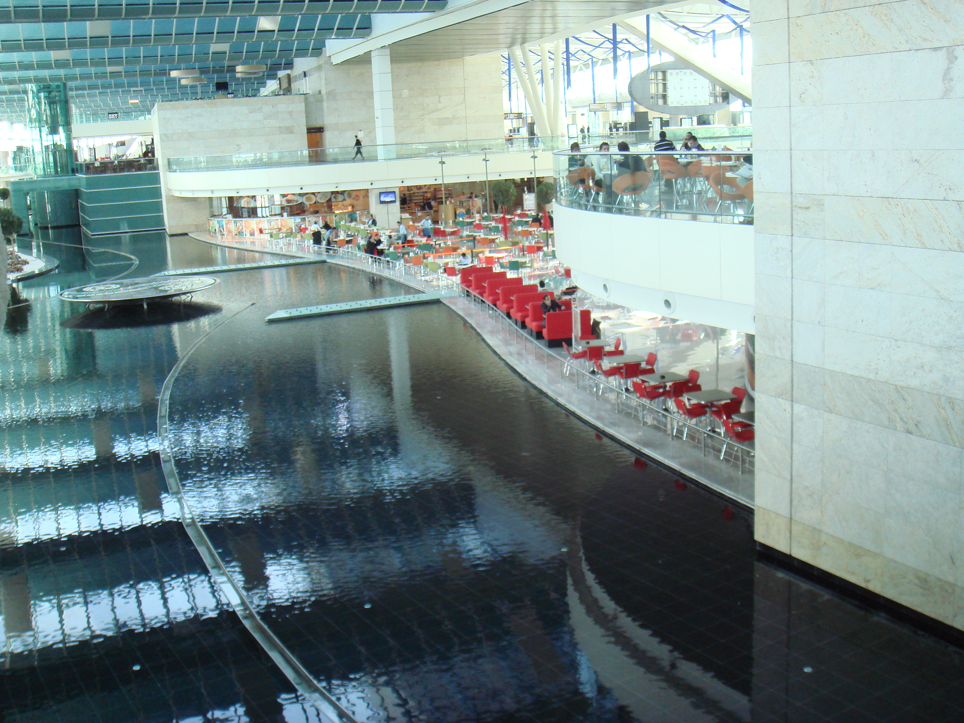 Одна из технологий формирования микроклимата аэропорта.(Турция) (Lake microclimate in airport building)